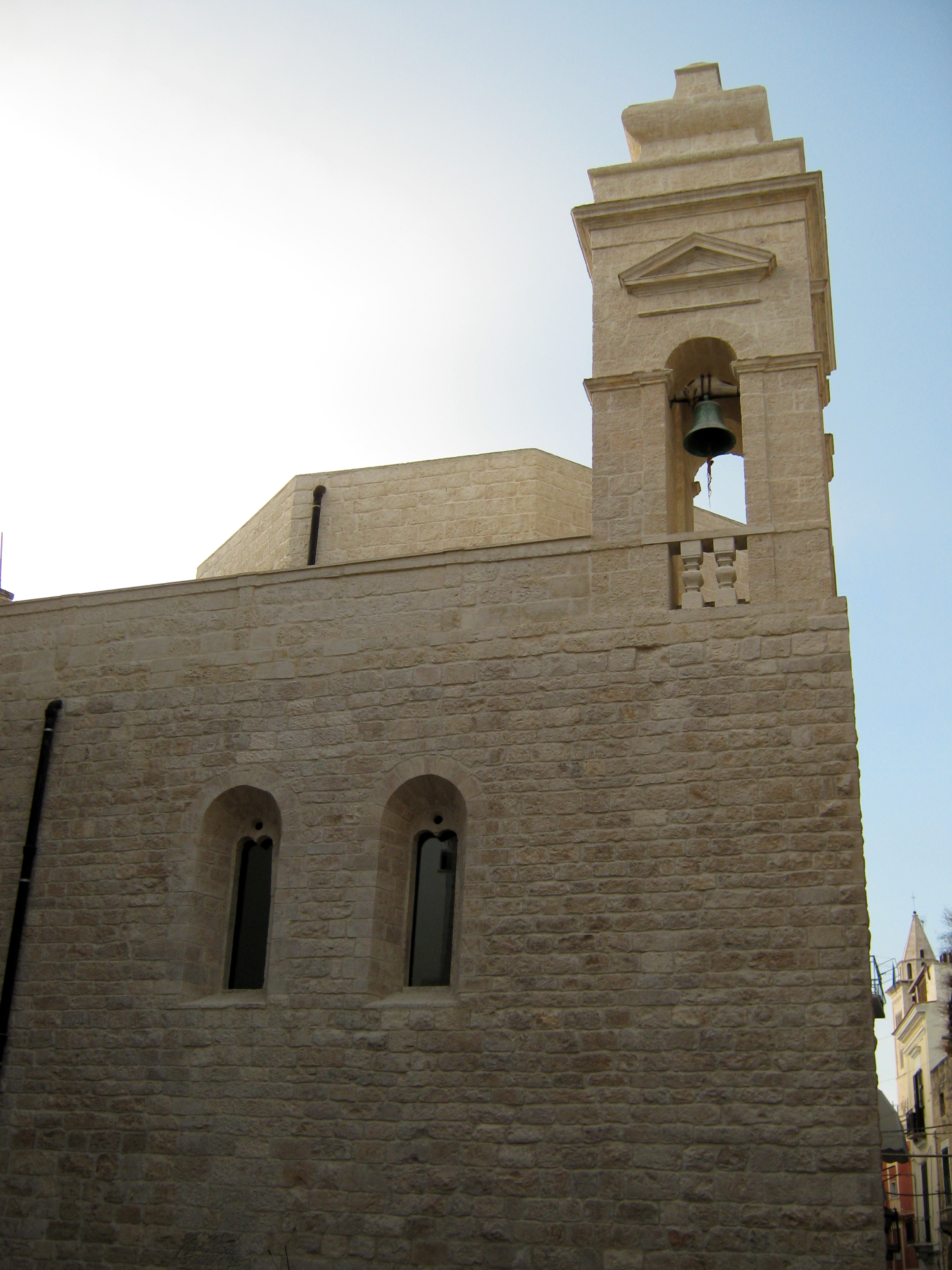 chiesa sant'anna trani